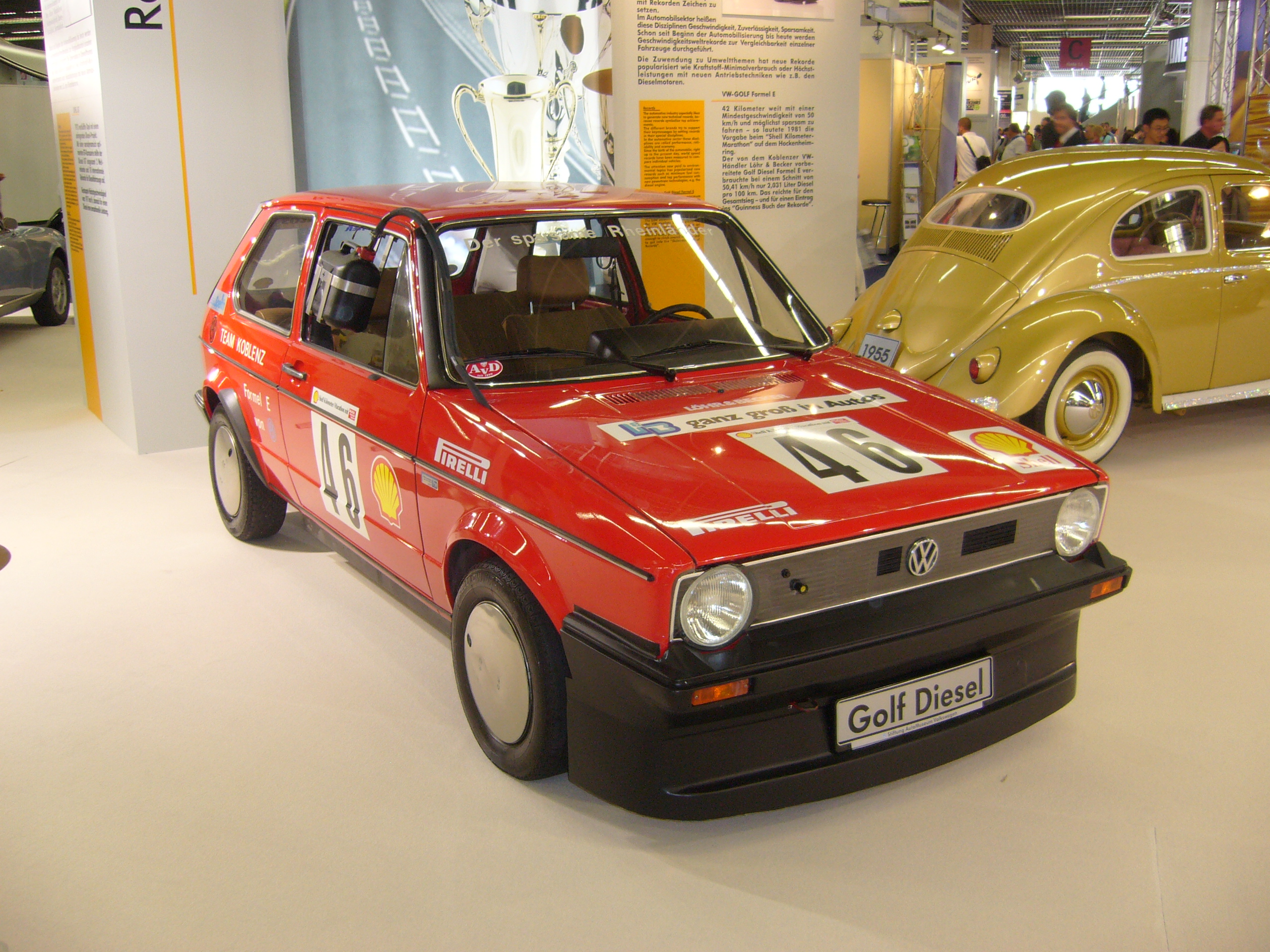 Volkswagen Golf Diesel Rallye